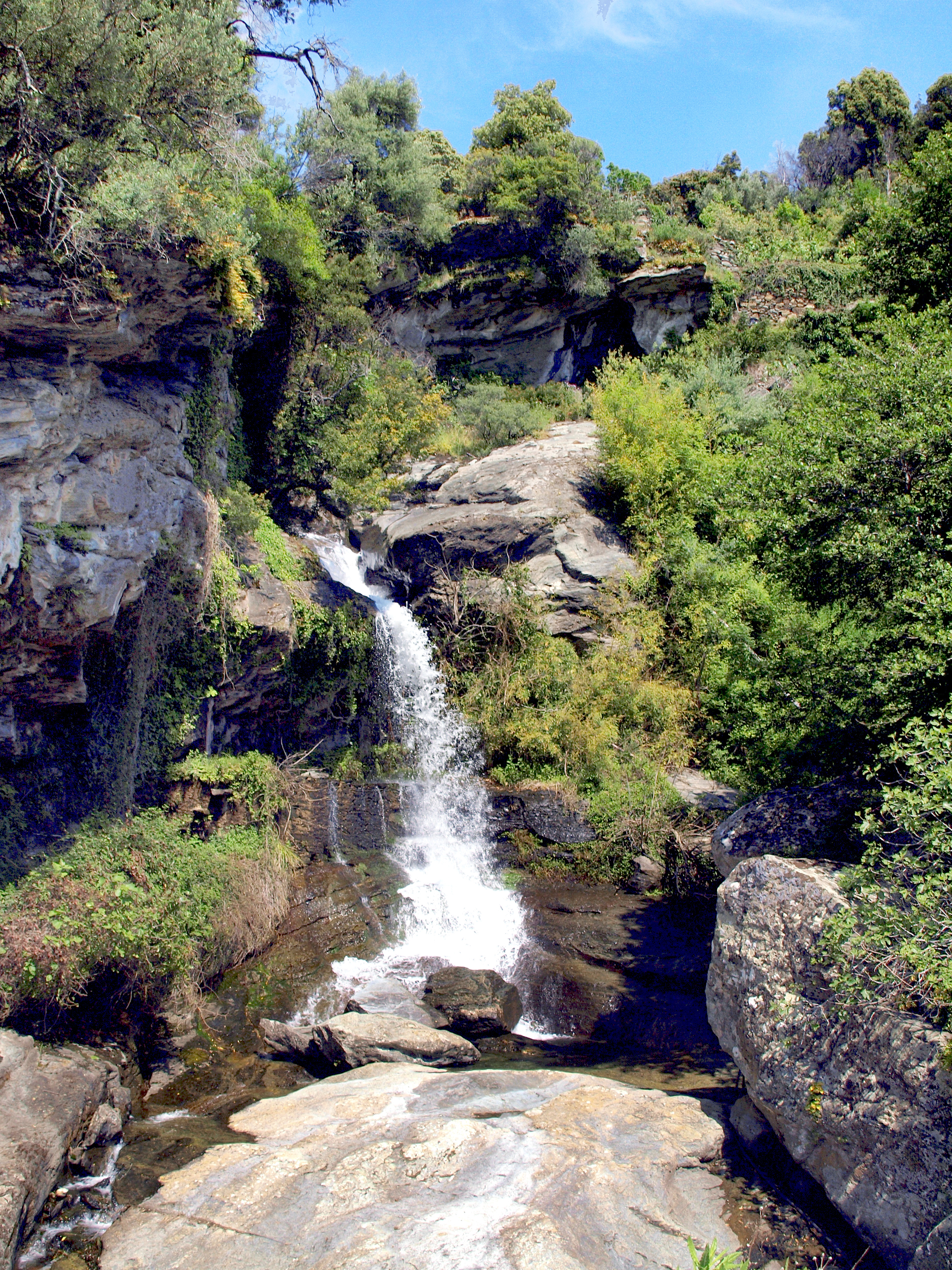 Santa-Maria-di-Lota, Cap Corse - Le ruisseau de Poggiolo (fiume di Poggiolu), dit aussi « fiume Miomo », a son embouchure au sud de la plage de galets de Miomo. Il est ici en amont du pont de la D31, entre Favale et Annetto.